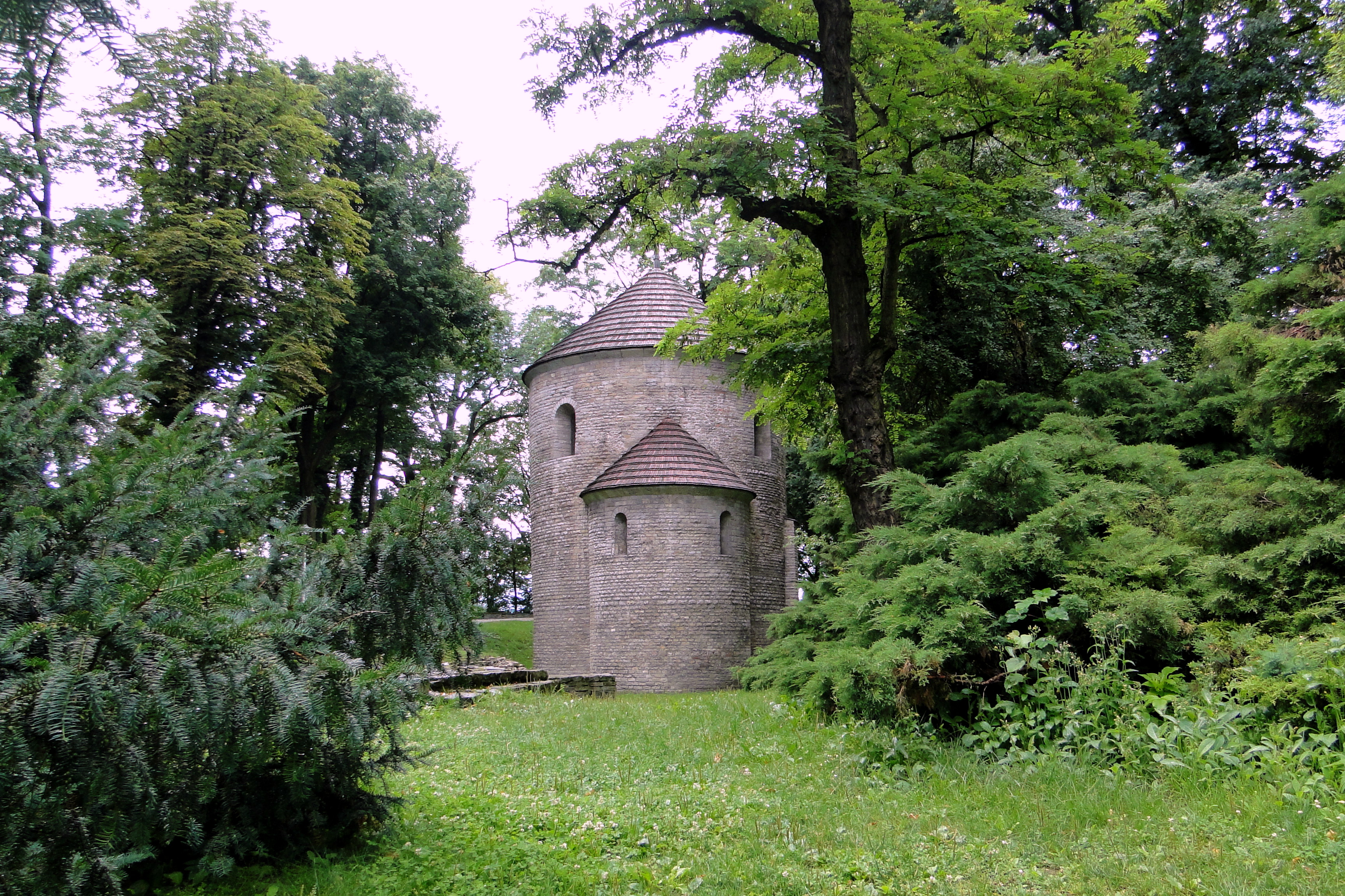 Rotunda w Cieszynie